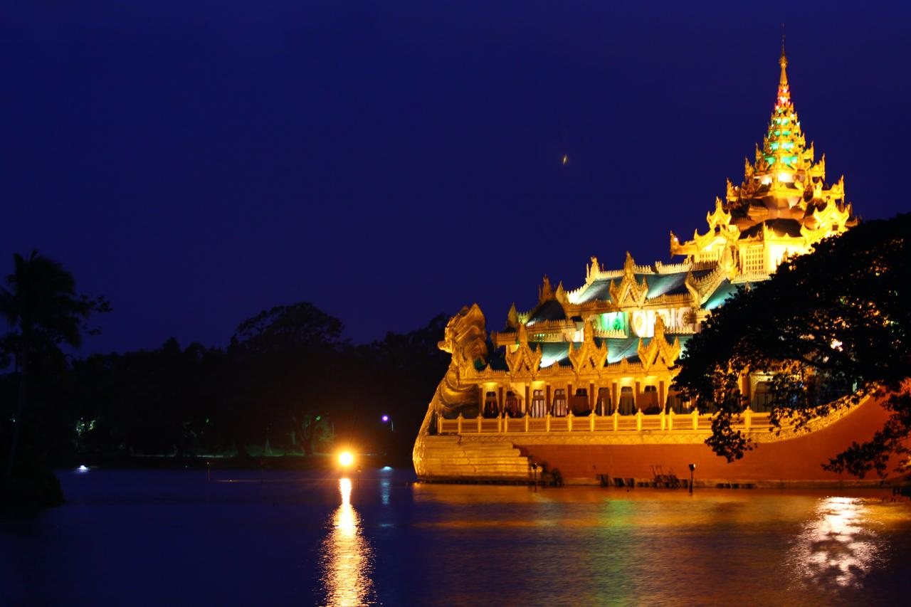 Karaweik at nighttime, on Kandawgyi Lake in Yangon